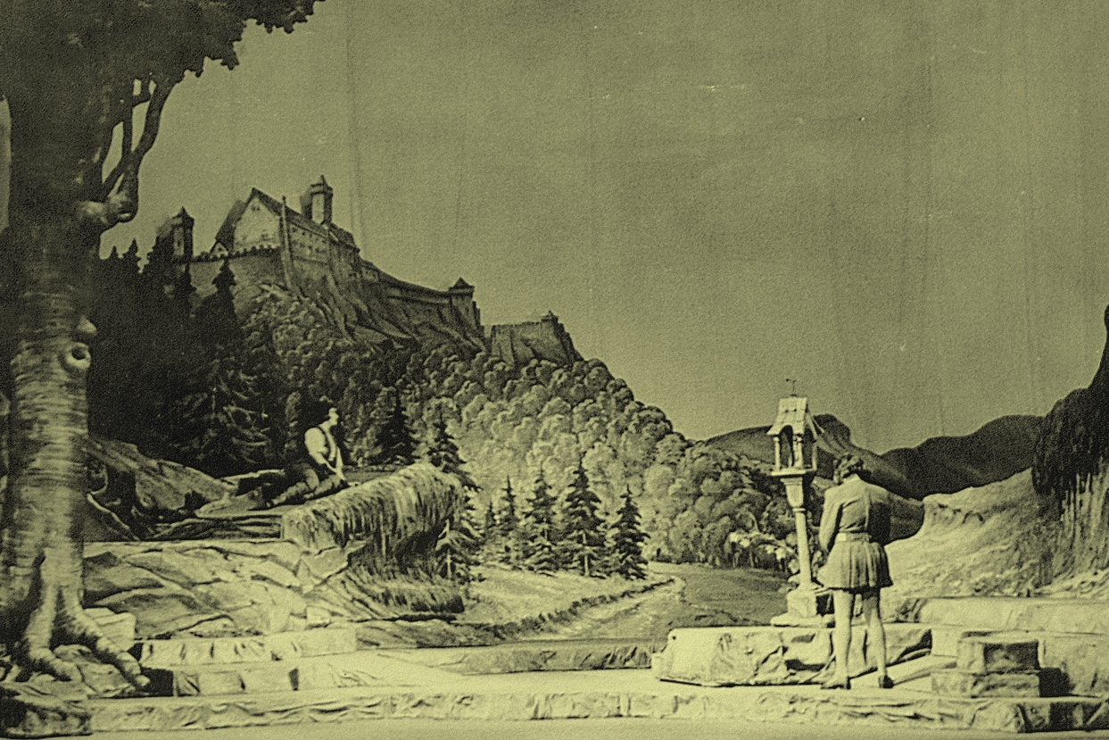 Szenenfoto aus der Oper Tannhäuser - hier die erste Nachkriegsinszenierung der Wagneroper am Landestheater Eisenach durch Karl-Heinz Kaiser, musikal. Leitung Horst Förster, Ausstattung Ulrich-Werner Donath.